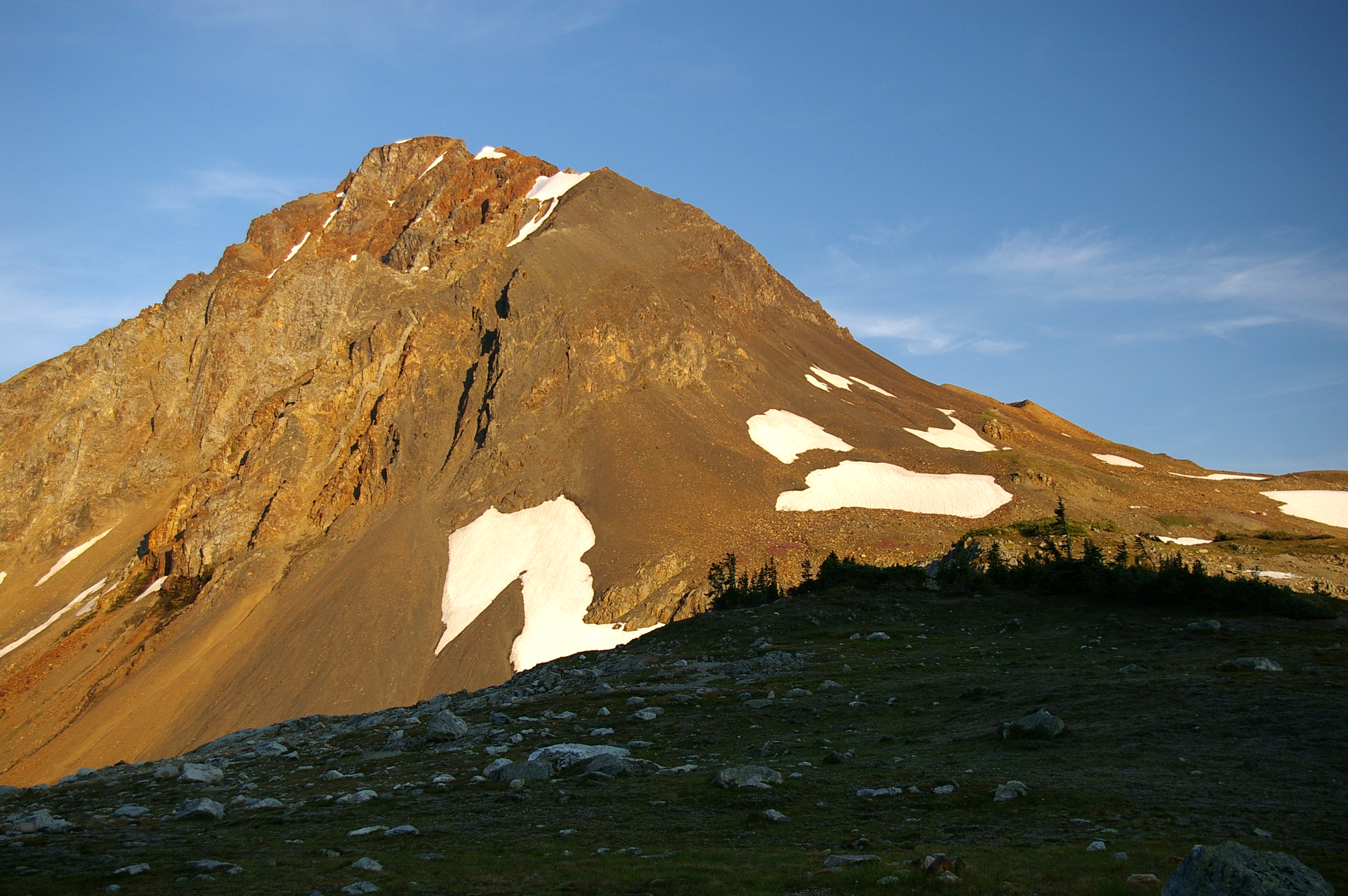 Fissile Peak viewed from Russet Lake